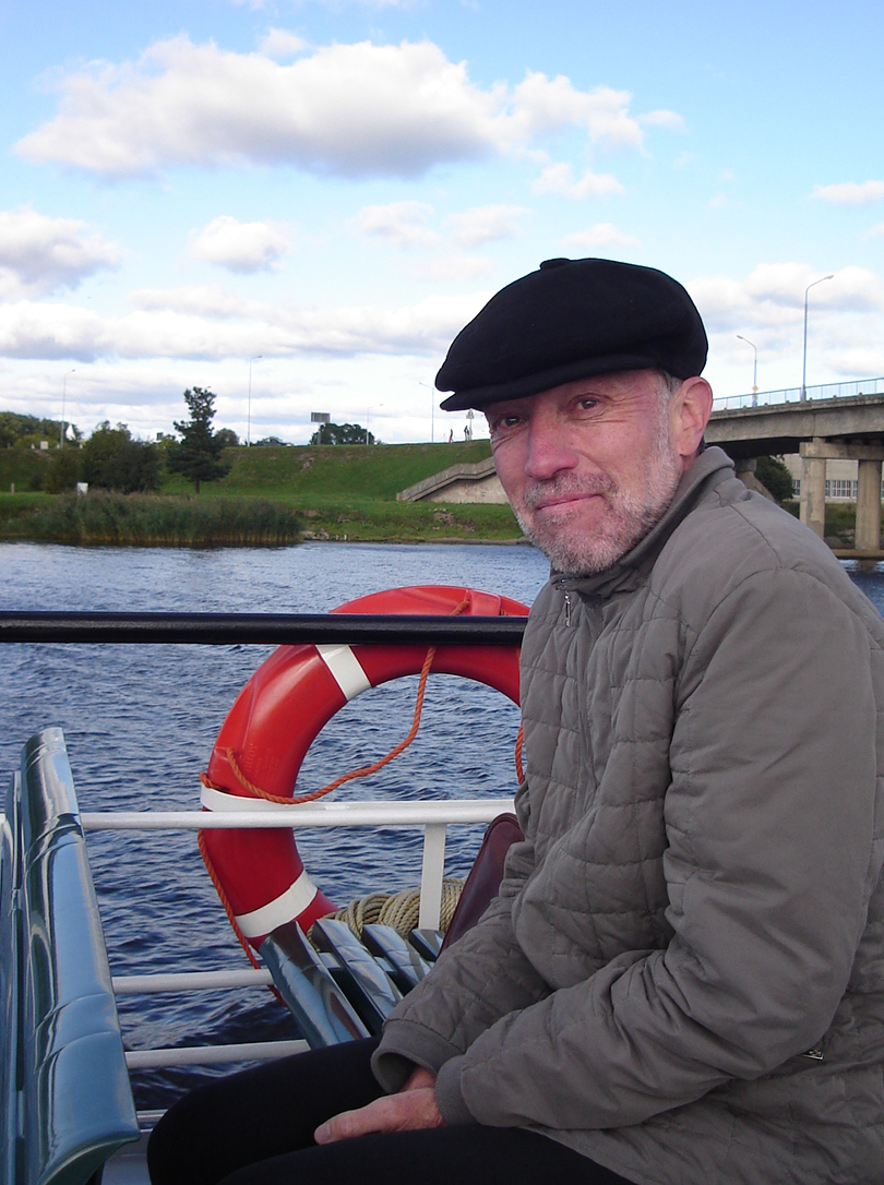 Swiss writer Urs Faes in Ventspils, Latvia